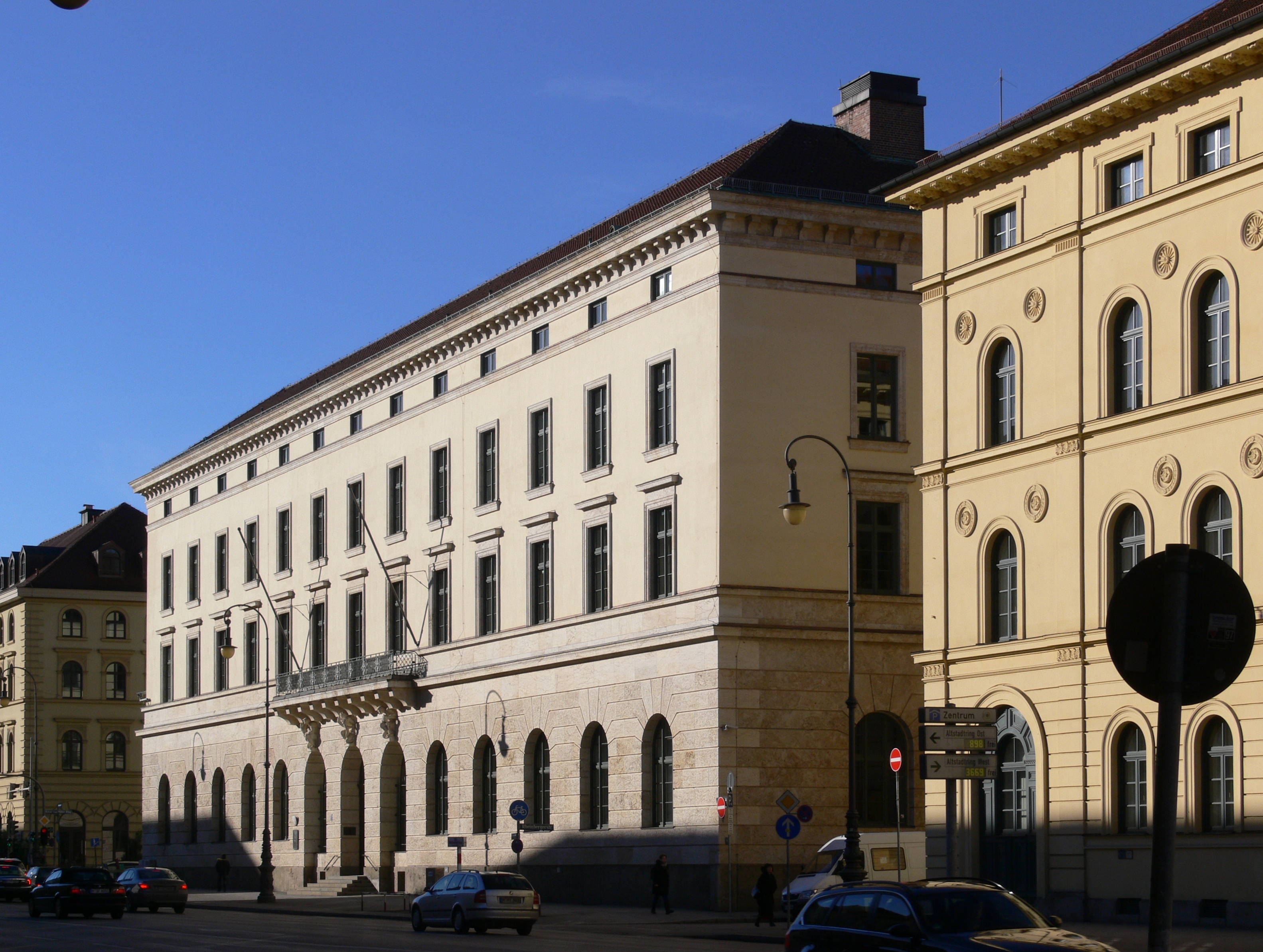 München, Ludwigstraße 13; Geburtshaus von „Sissy“, Kaiserin Elisabeth von Österreich und Königin von Ungarn (im Jahre 1837 geboren). Ehem. Herzog-Max-Palais (erbaut 1828-1830 von Leo von Klenze) und Landeszentralbank von Bayern, jetzt Hauptverwaltung der Deutschen Bundesbank, dreigeschossiger monumentaler Vierflügelbau, teils mit zusätzlichem Attikageschoss, neuklassizistisch dem Straßenbild angepasst; nach revidierten Plänen von Heinrich Wolf begonnen, 1938-41, von Carl Sattler vollendet, 1948-51; mit Ausstattungsdetails des Vorgängerbaues, u. a. Schwanthaler-Reliefs von 1828/29. This is a photograph of an architectural monument.